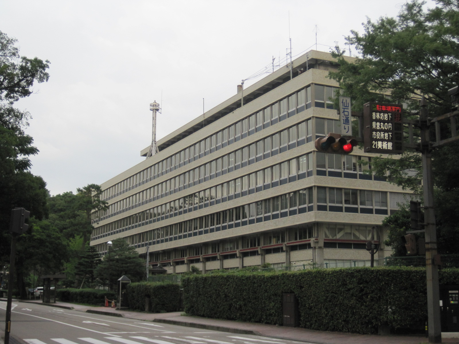 石川県金沢市広坂にある金沢広坂合同庁舎。北陸農政局、北陸総合通信局、金沢国税局、税務大学校金沢研修所、石川行政評価事務所が入居している。